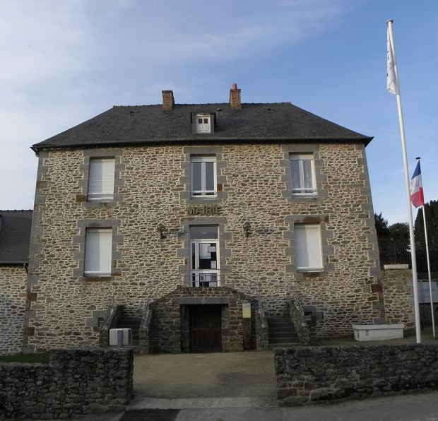 Mairie de Tressé (35). .